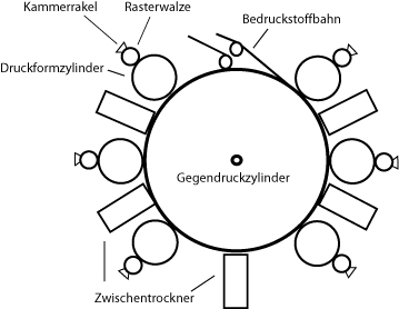 Flexodruckmaschine in Satellitenbauweise (Zentralzylindermaschine)